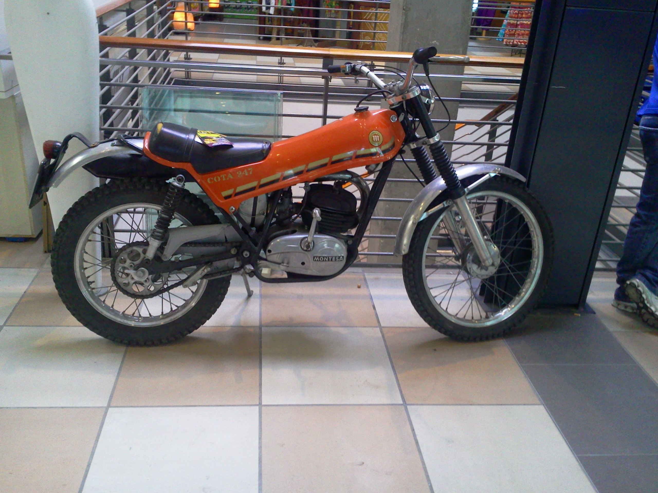 Montesa Cota 247 fotografata al "My Cpecial car Show"